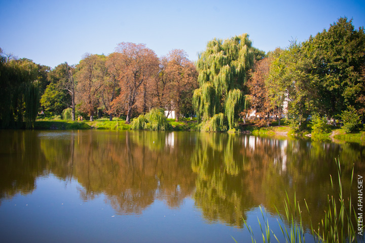 Парк, Андрушівка, вул.Леніна, 28